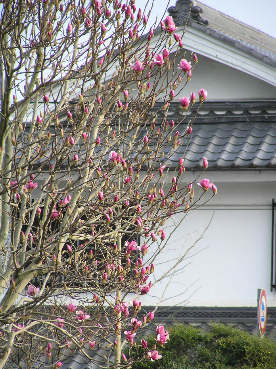 蕾のシモクレンと古民家 【おぉたむ すねィく探検隊】写真部門 担当 大原佳苗 ～photo by Autumn Snake